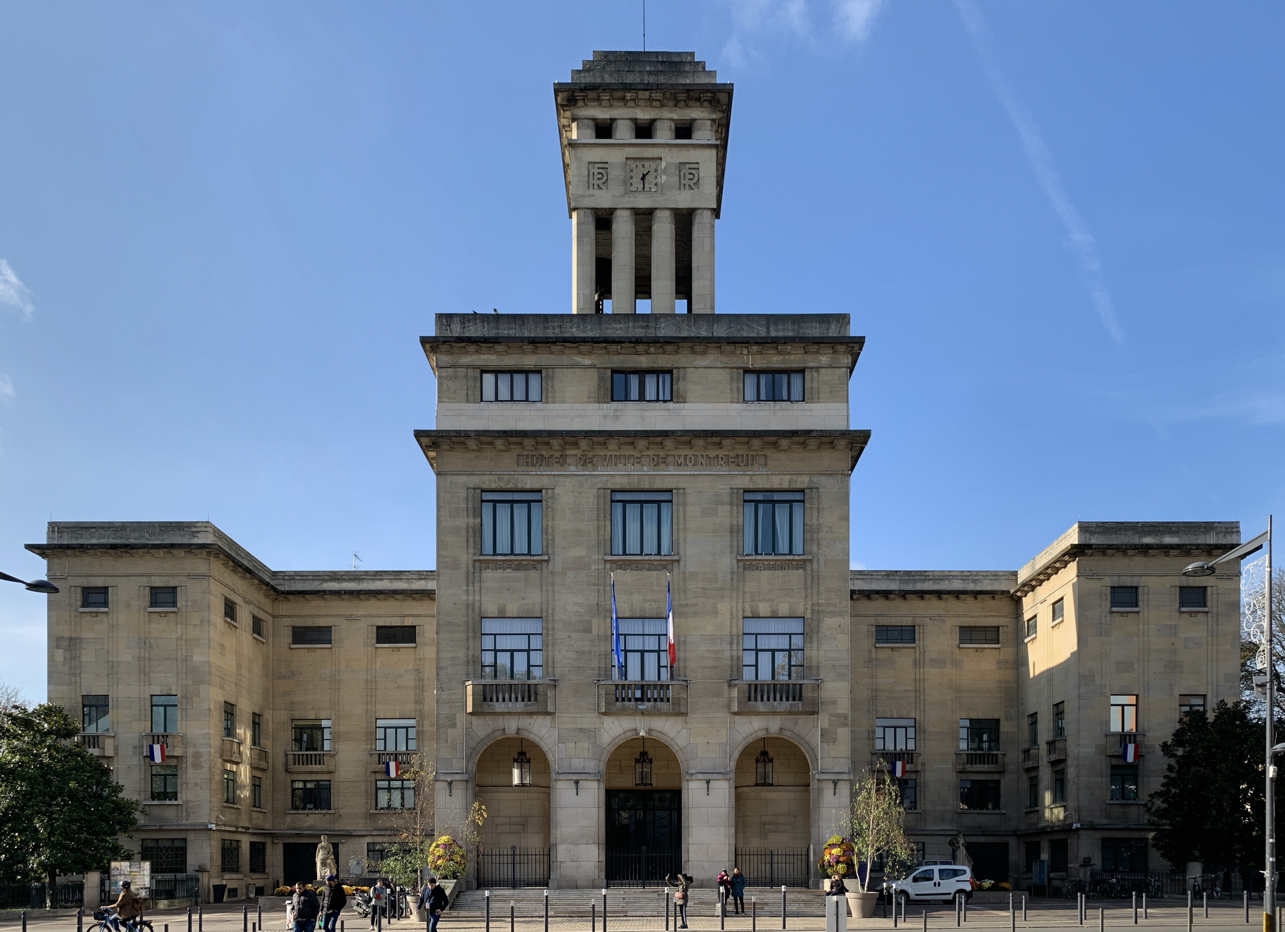 Hôtel de ville de Montreuil, Seine-Saint-Denis.